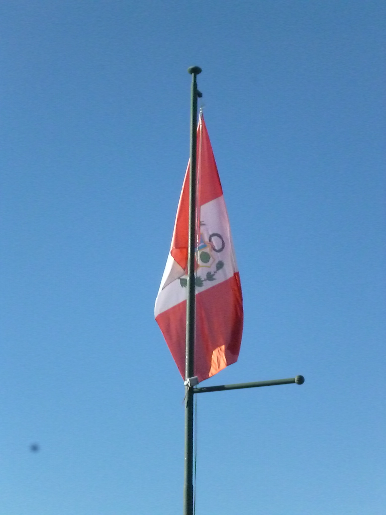 Bandera peruana en la Plaza de las Colectividades en la ex estación de tren de Trelew